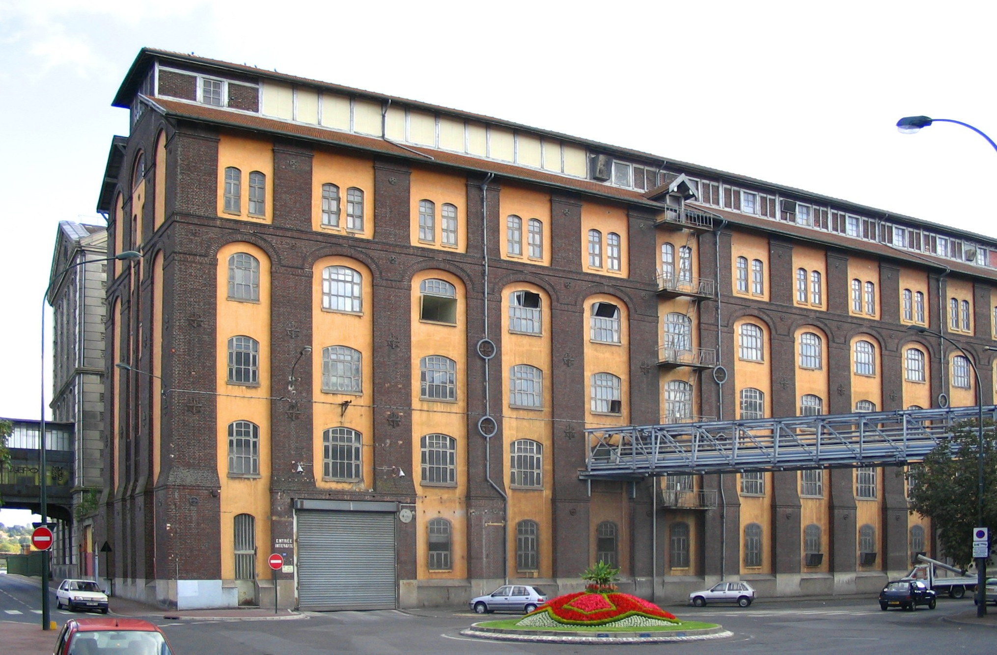 Grands moulins de Corbeil - Architecte Paul Friesé 1893 - Corbeil-Essonnes, France